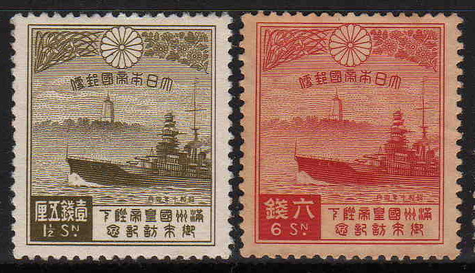 1935年4月2日に満州国皇帝溥儀来日記念として発行された記念切手のうち、戦艦比叡と中国の遼陽の白塔を描いた1.5銭と6銭切手